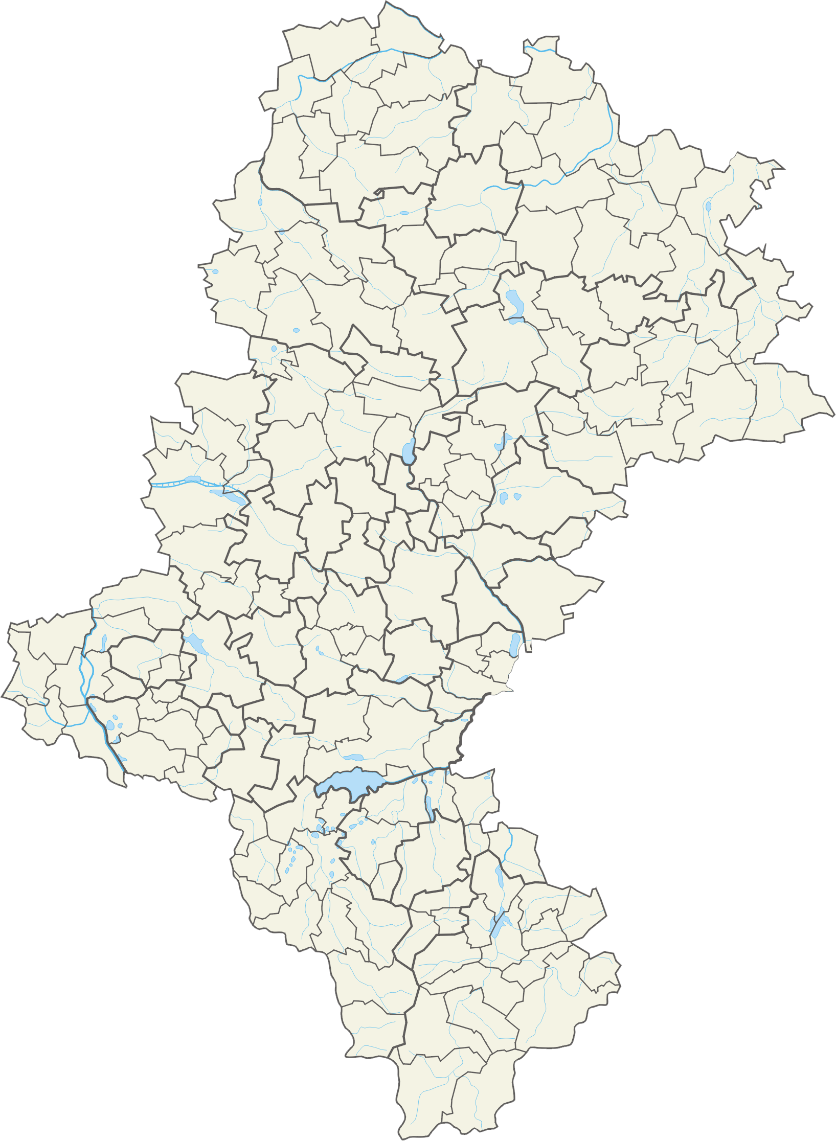 Województwo śląskie – powiaty i gminy Współrzędne graniczne mapy: N: 51.0994° N S: 49.3939° N W: 18.0350° E E: 19.9739° E